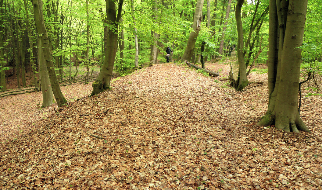 Dehmer Burg